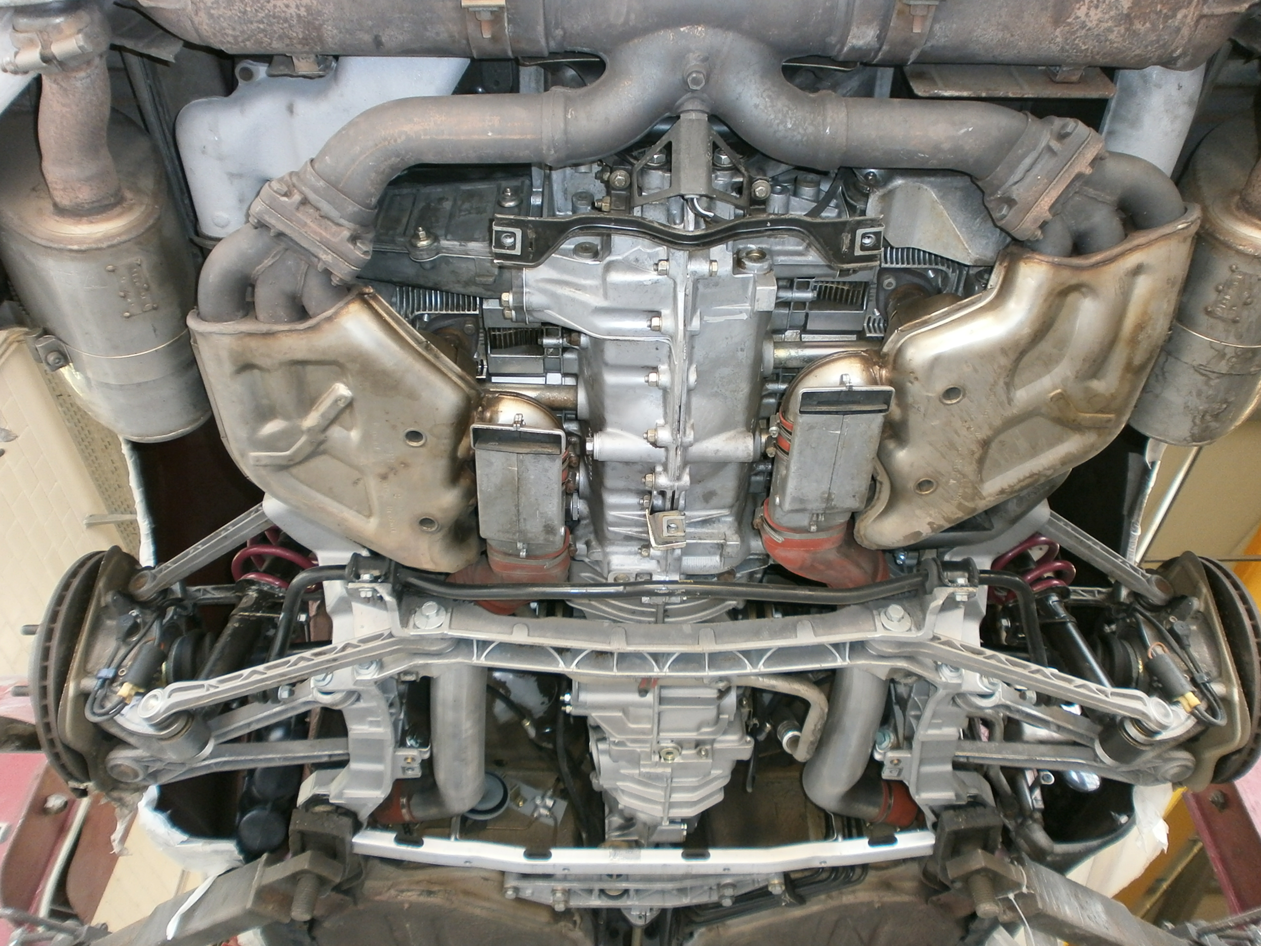 Ansicht vom Porsche 911 Serie 993 Motor von unten. Serienzustand, allerdings mittels COL2-Eisstrahlen gereinigt.